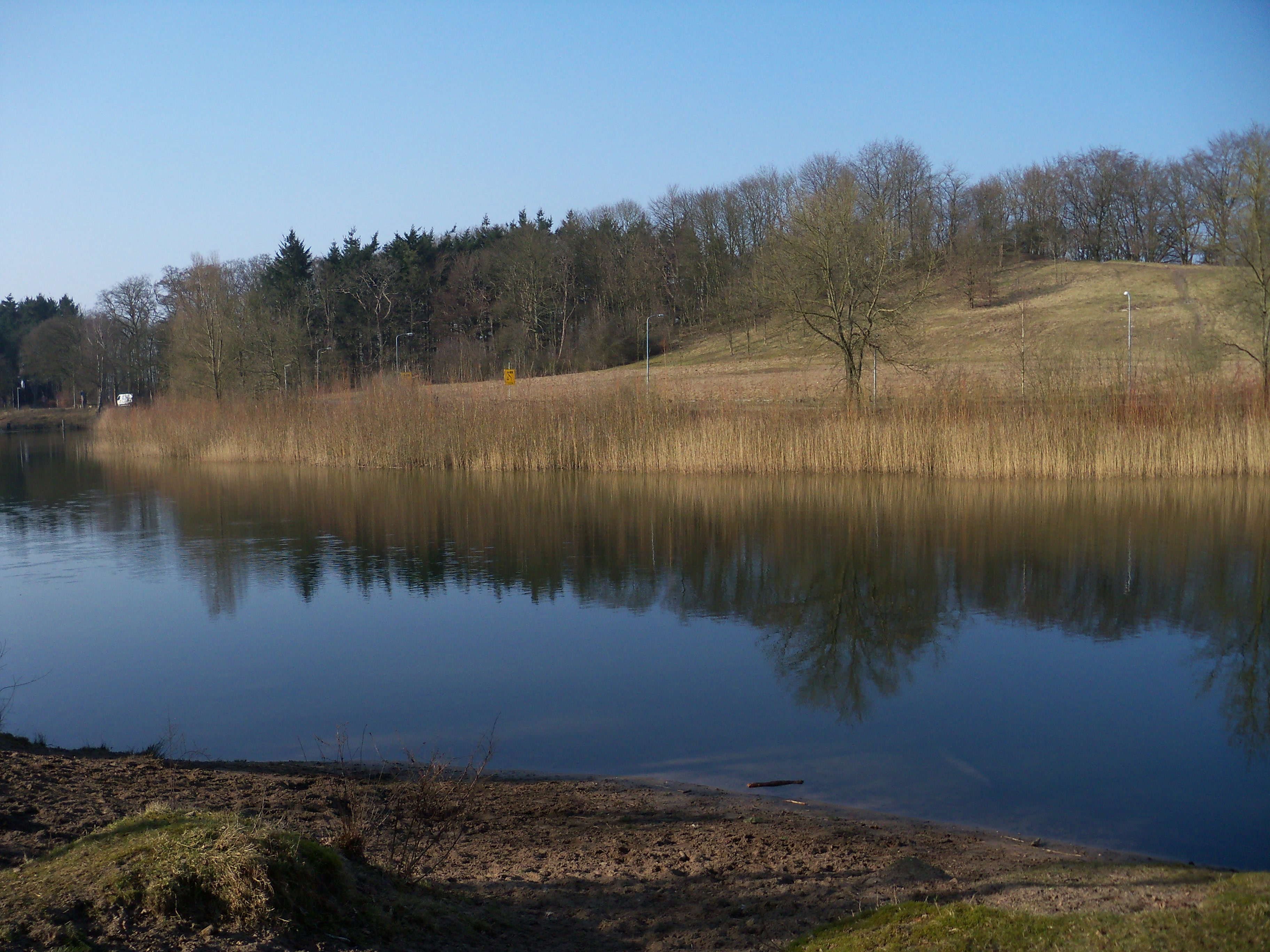 17 maart 2015, Anna's Hoeve, Bergvijver met Berg op de achtergrond